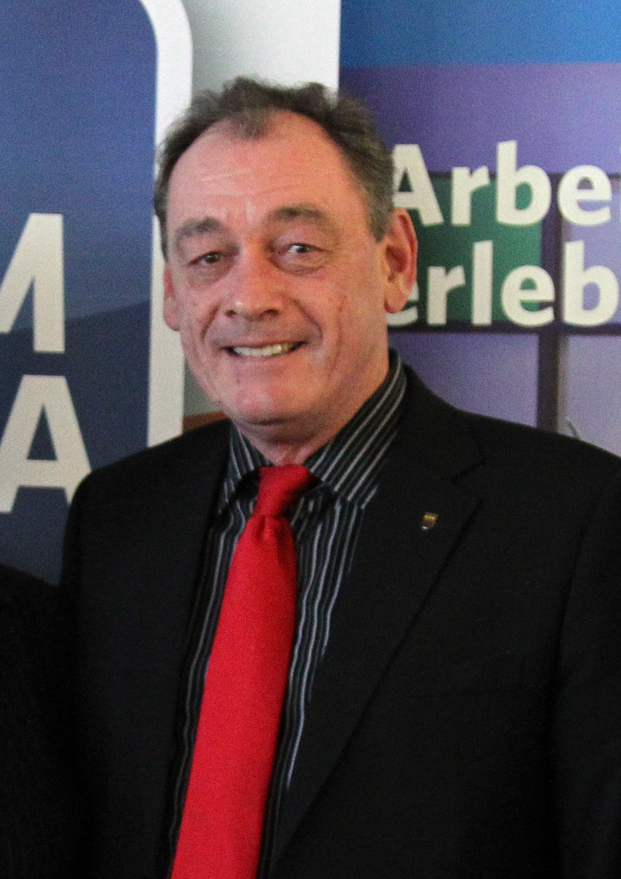 Staatssekretär Reinhold Lopatka, Mag. Doris Bock (Geschäftsführerin), Dieter Posch (Bürgermeister v. Neudörfl), Landtagsabgeordneter Mag. Christian Sagartz. Foto: Mahmoud